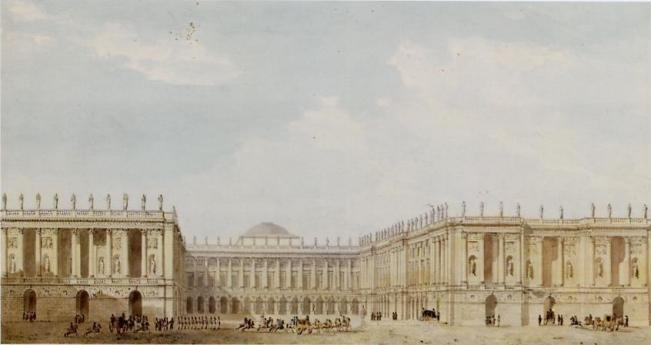 Projet de reconstruction du château de Versailles du côté de la ville.